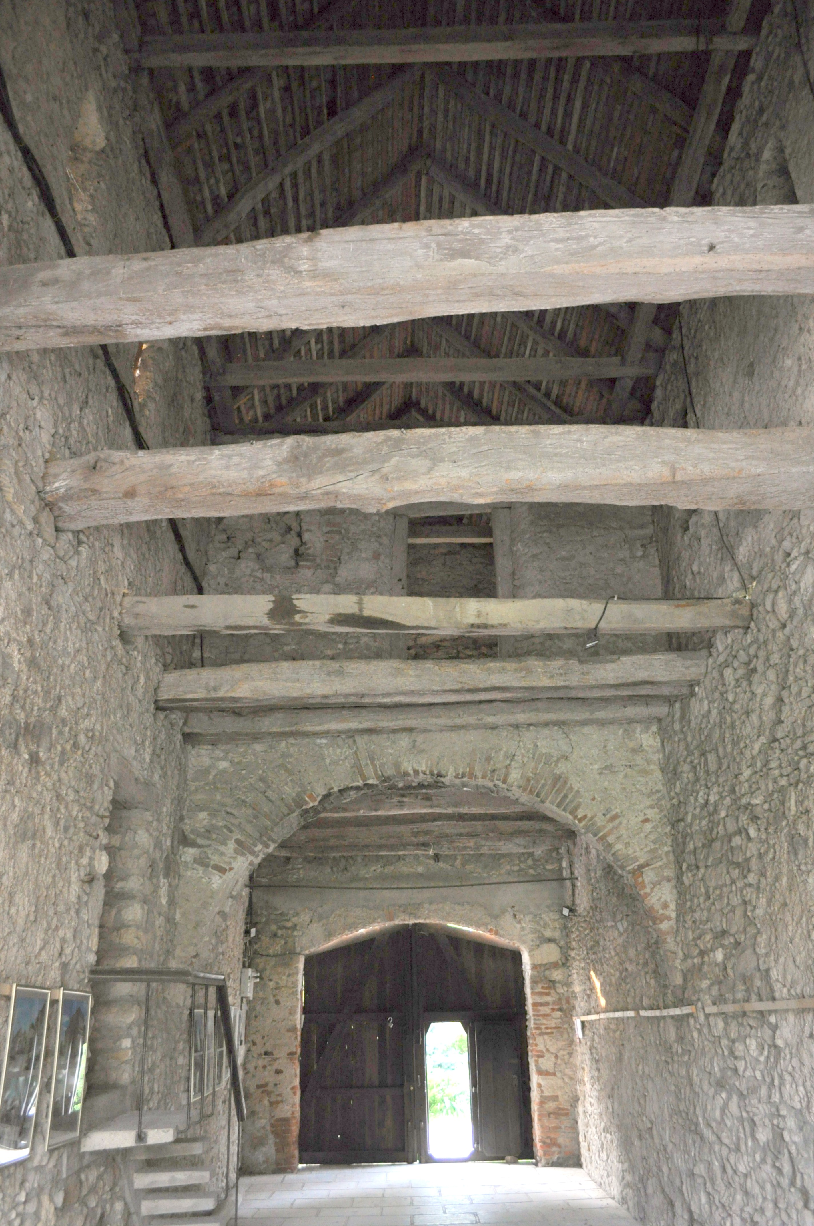 Cetatea Câlnic, județul Alba 03